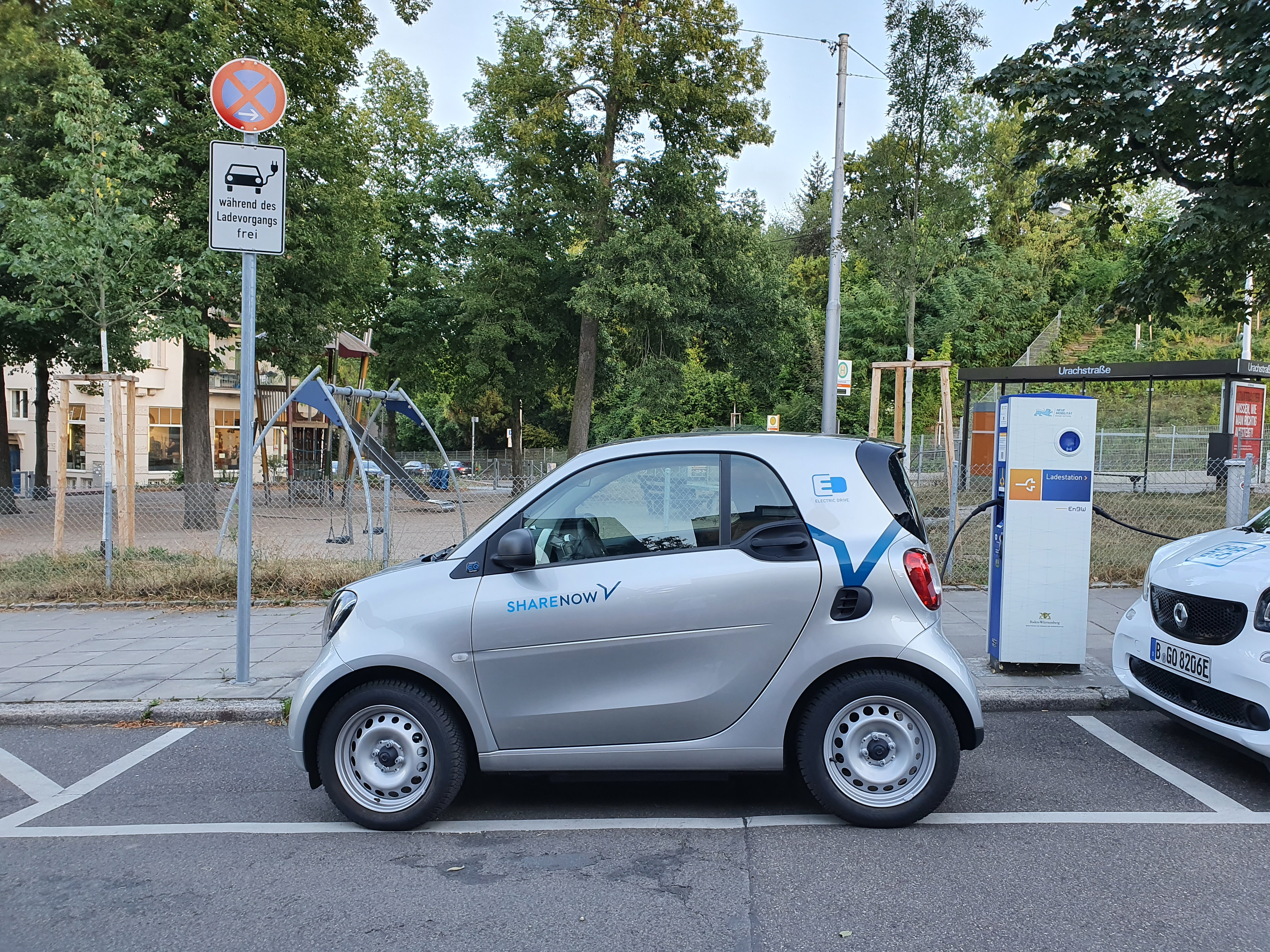 Ein Smart EQ von Share Now in Stuttgart.